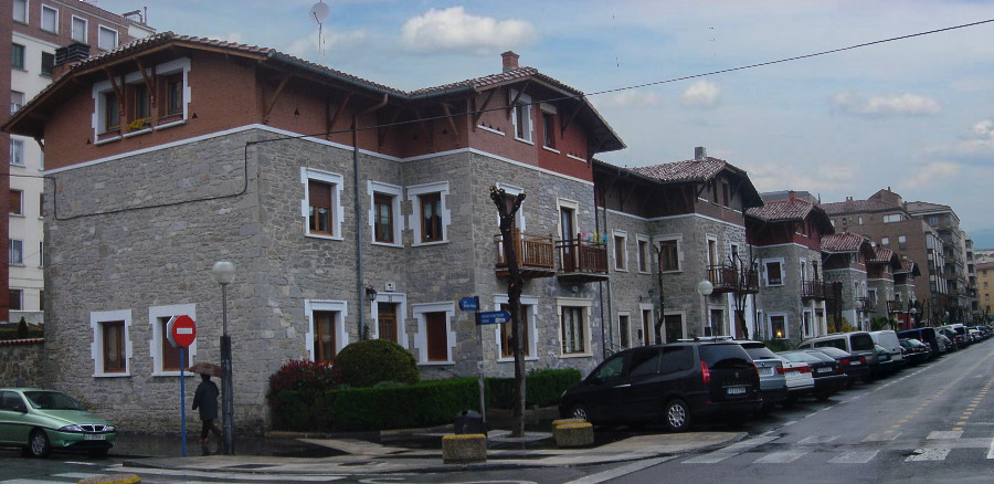 Judimendiko "etxe merkeak" (Vitoria-Gasteiz)